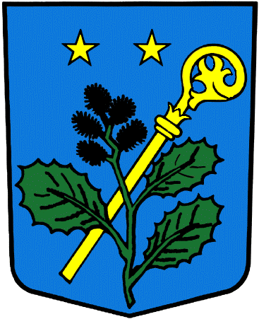 Wappen von Vernamiège